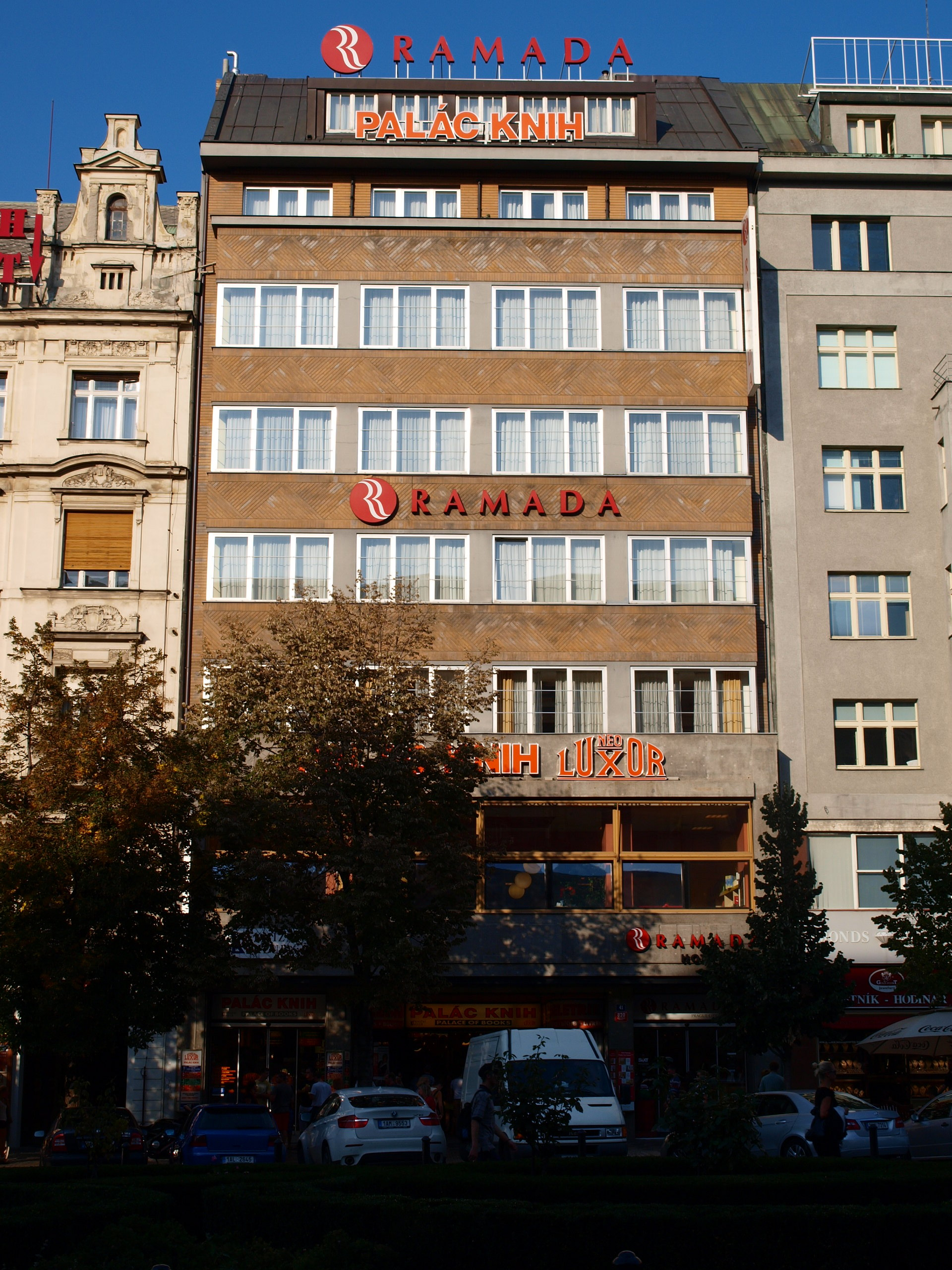 Palác Luxor